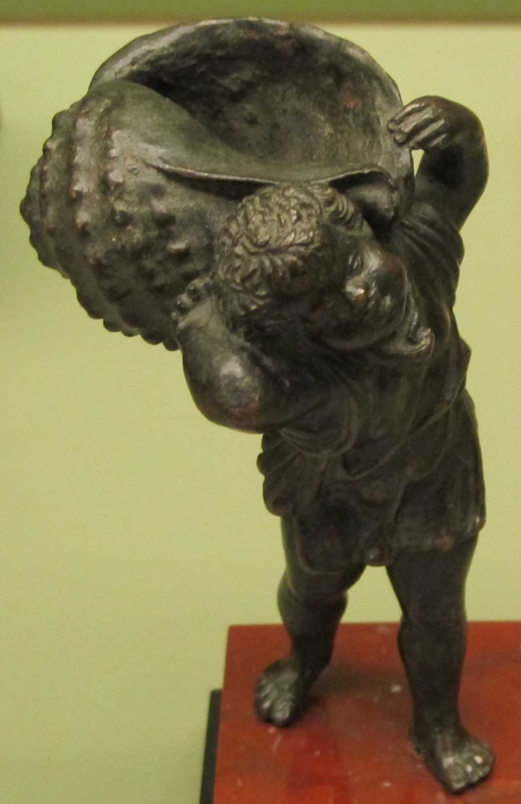 Severo calzetta da ravenna, ragazzo con conchiglia